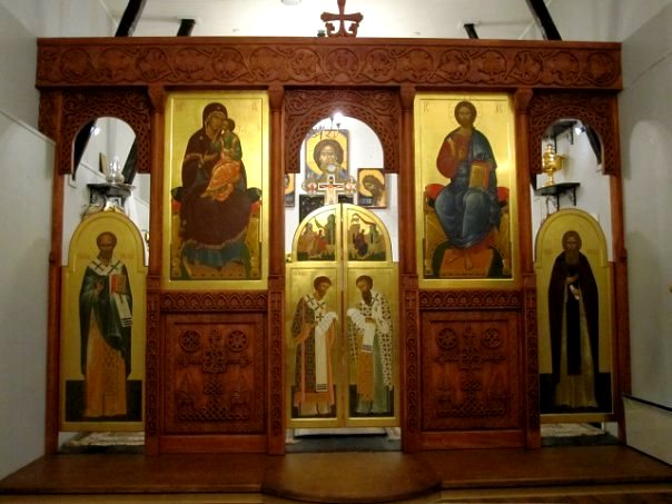 Русская церковь Успения при Генеральном консульстве России в Турку